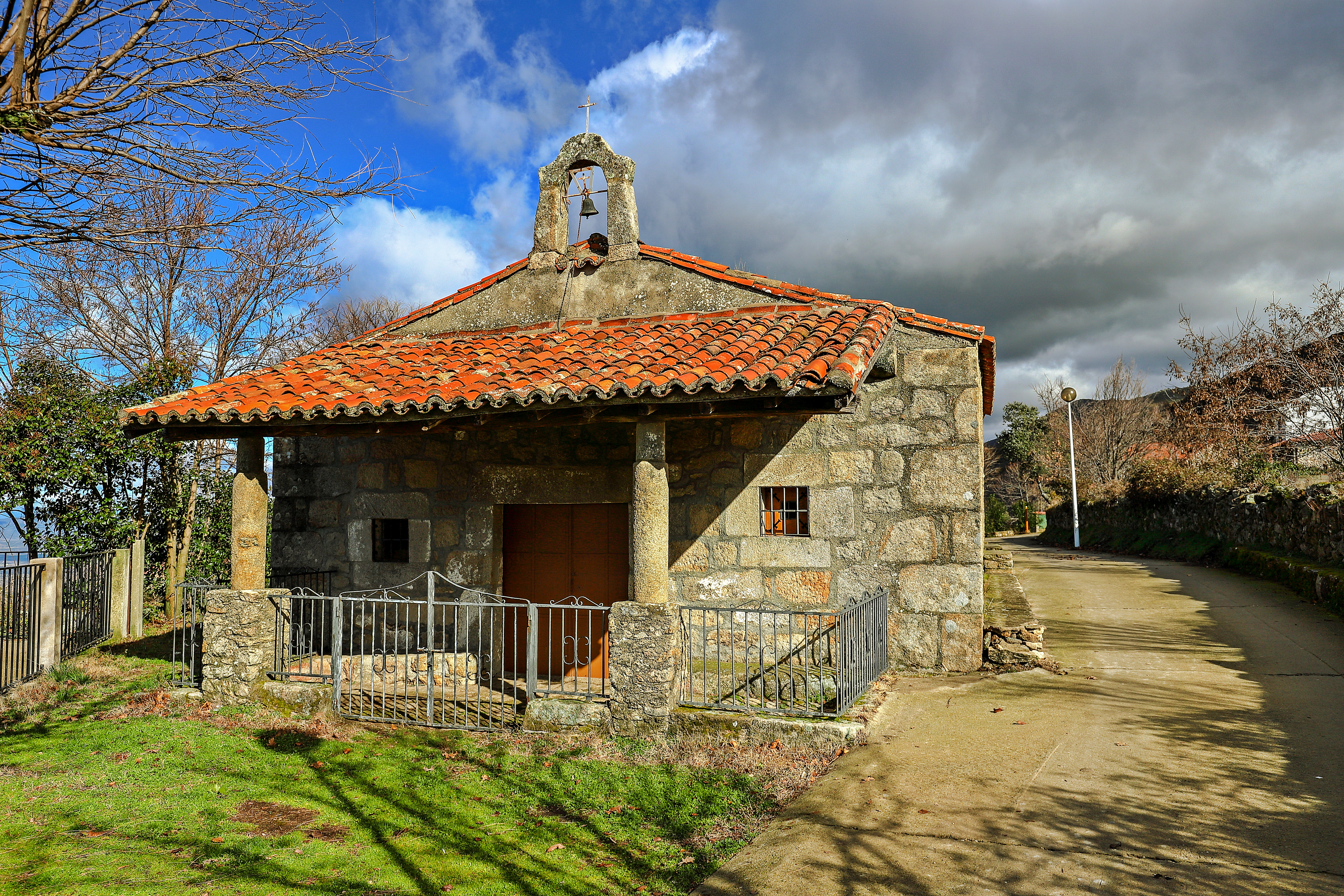 Cabezabellosa es un municipio de la comarca de Trasierra en la provincia de Cáceres.